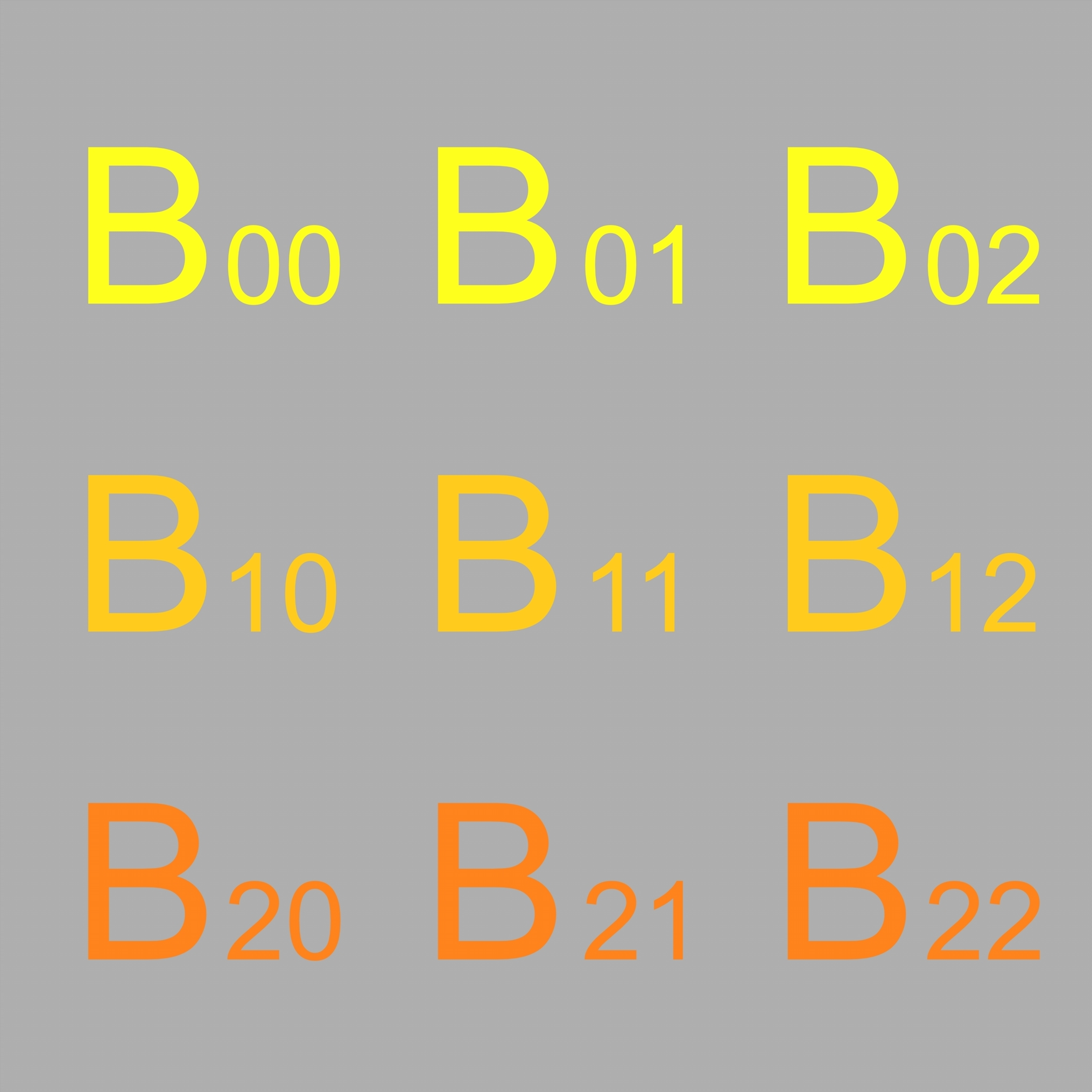 Die Abbildung zeigt die Matrix B. Diese ist gelb eingefärbt, um diese im Video über den Ablauf des Algorithmus zu erkennen.